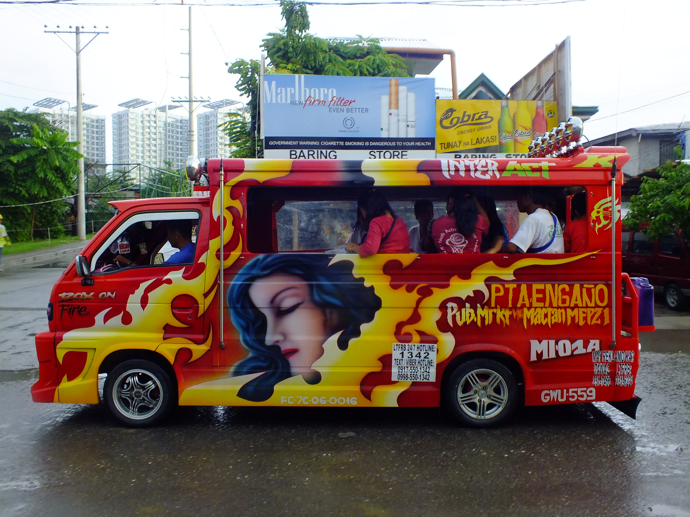 2016-09-29Jeepney in Mactan Cebu